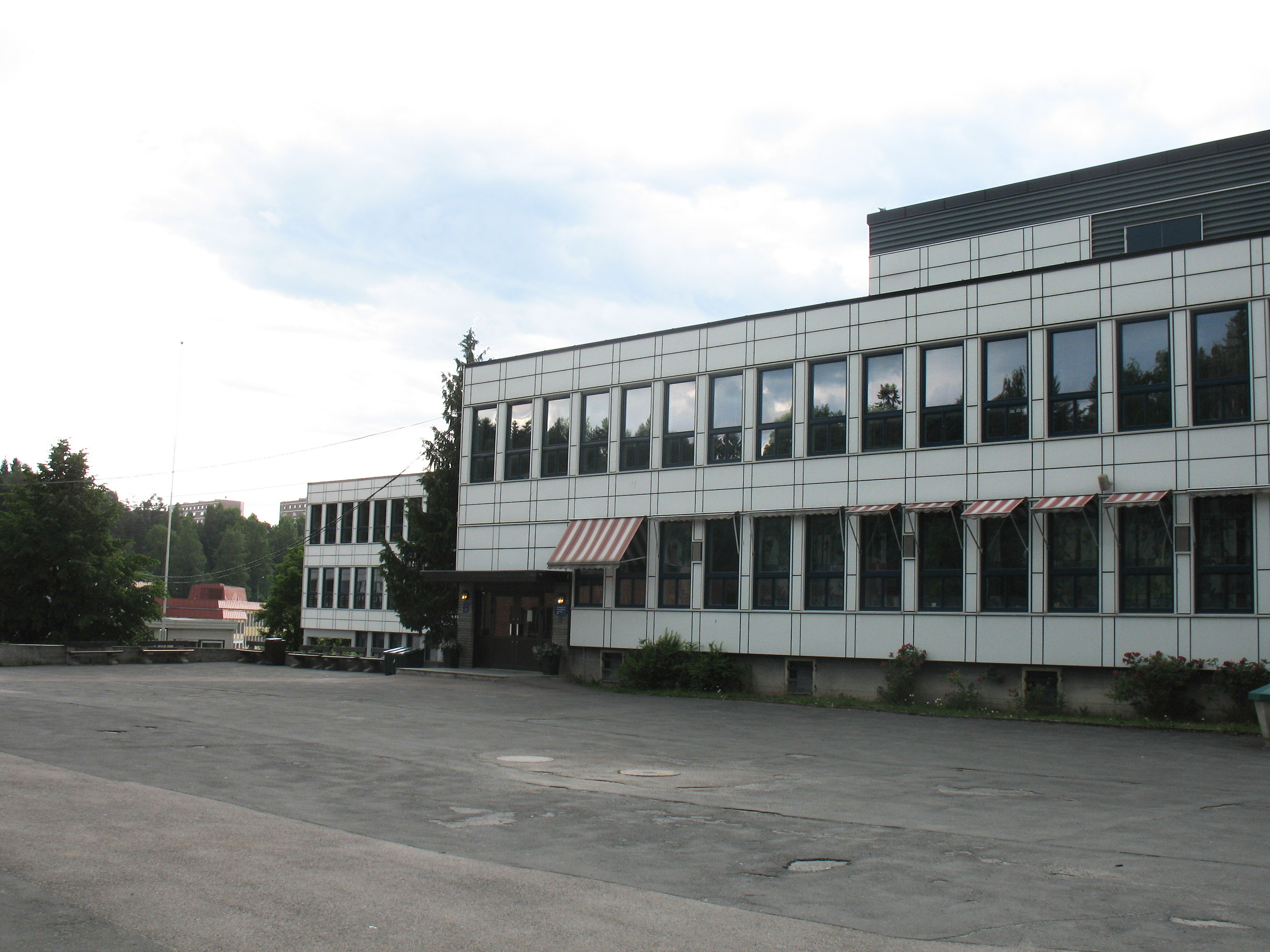 Ulsrud videregående skole, Oslo